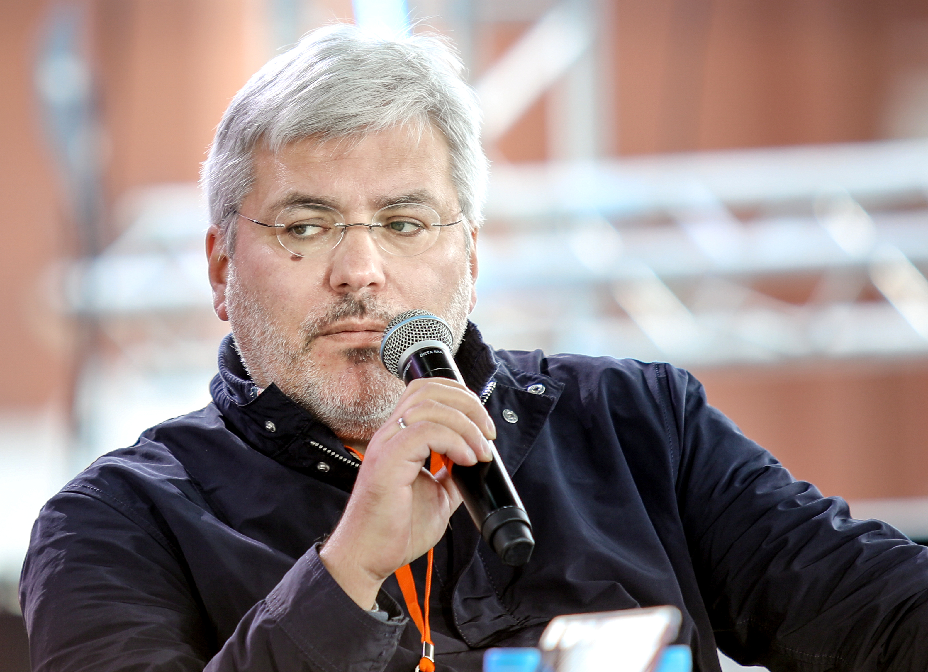 Евгений Водолазкин (писатель) на книжном фестивале "Красная площадь"-2017.